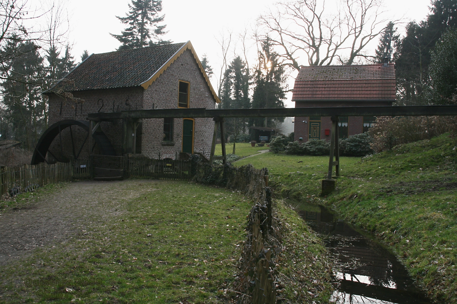 Plasmolen: Bovenste Plasmolen